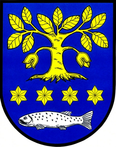 znak, Mladé Buky, okres Trutnov